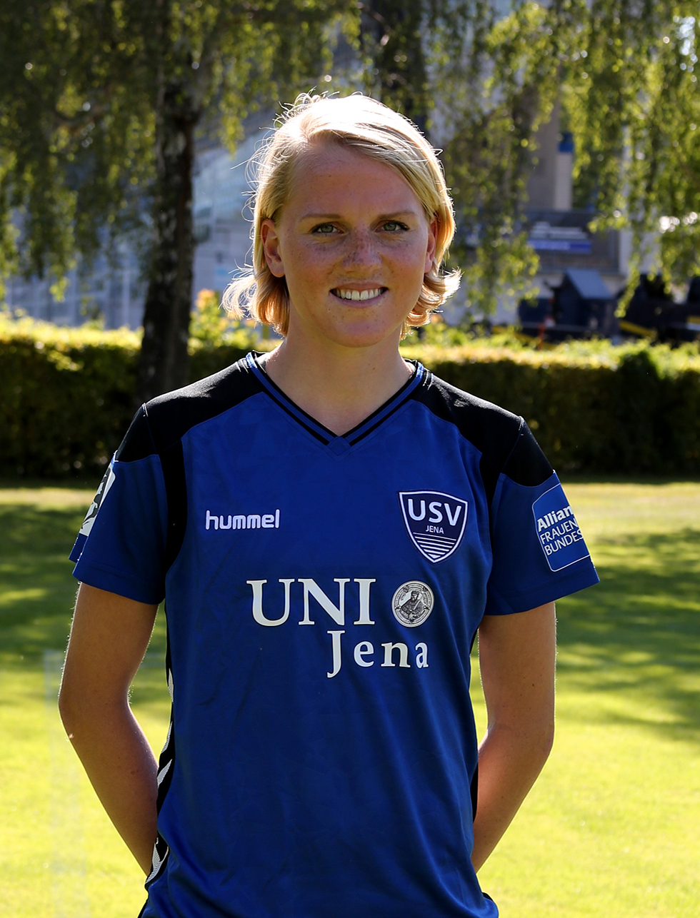 Lina Hausicke bei der Teamvorstellung des USV Jena 2016